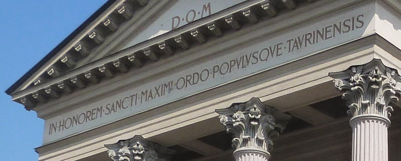 Portalinschrift der Kirche San Massimo in Turin: Zu Ehren des heiligen Maximus - Klerus und Volk von Turin